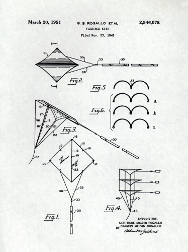 Prvý známy písomný záznam z patentového úradu USA o možnosti lietať pomocou trojuholníkového krídla